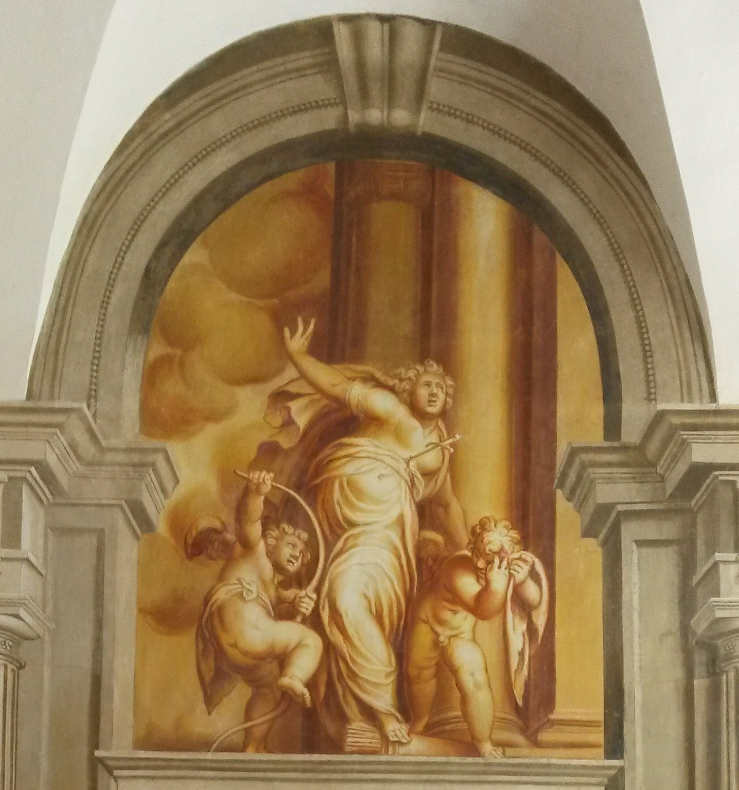 Paolo Farinati, Suicidio di Lucrezia, 1590 circa, affresco, Villa Nichesola-Conforti, Ponton di Sant'Ambrogio di Valpolicella (Verona).